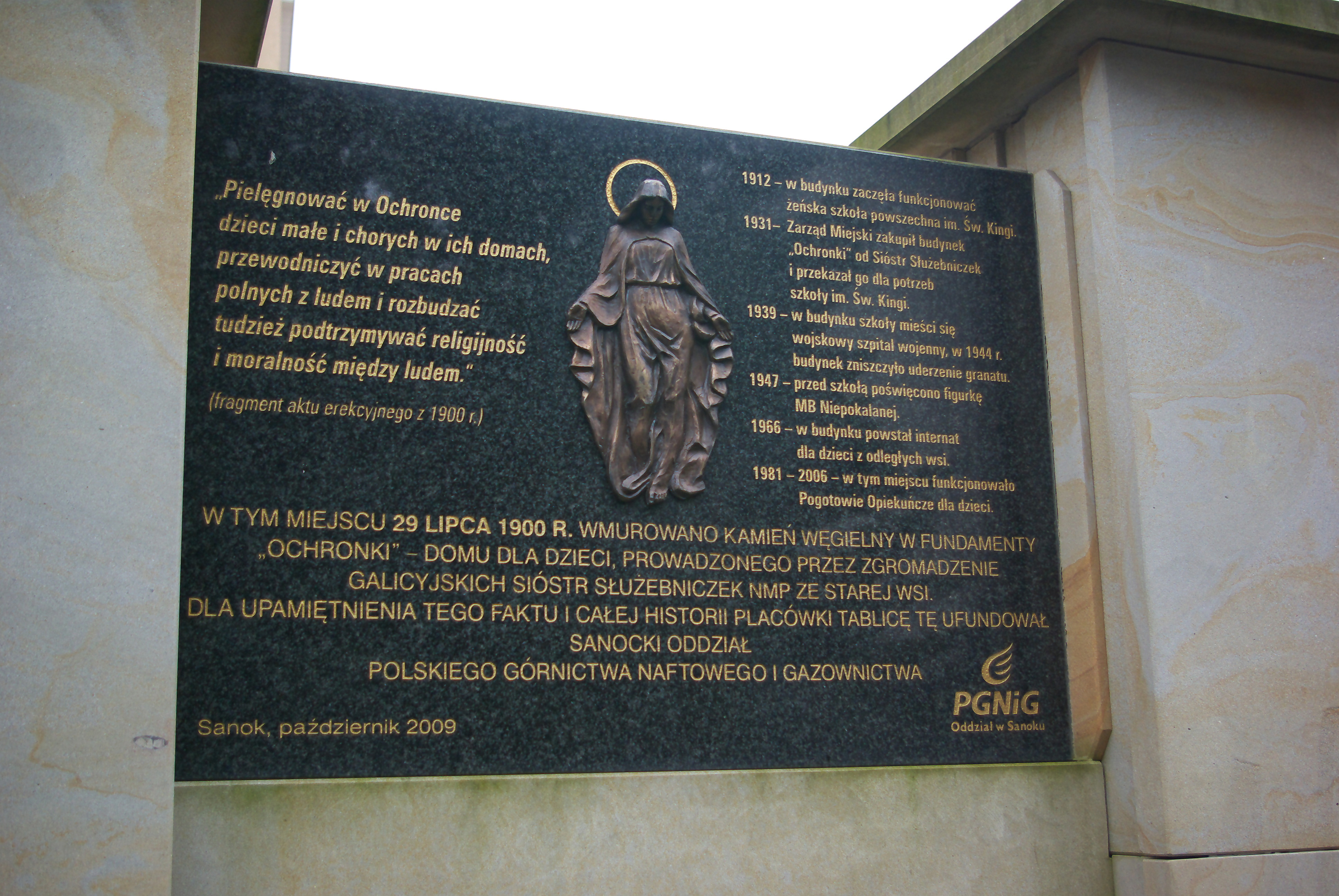 Tablica pamiątkowa przy ul. Sikorskiego w Sanoku